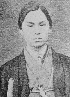 阿部正静の肖像写真。